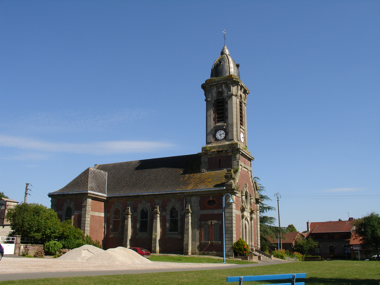 Église de Foncquevillers